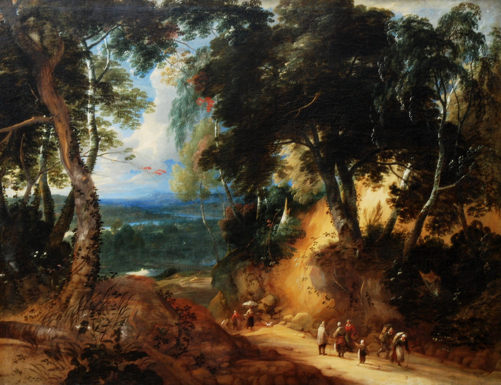 Het Zoniënwoud met marktkramerstitle QS:P1476,nl:"Het Zoniënwoud met marktkramers" label QS:Lnl,"Het Zoniënwoud met marktkramers"